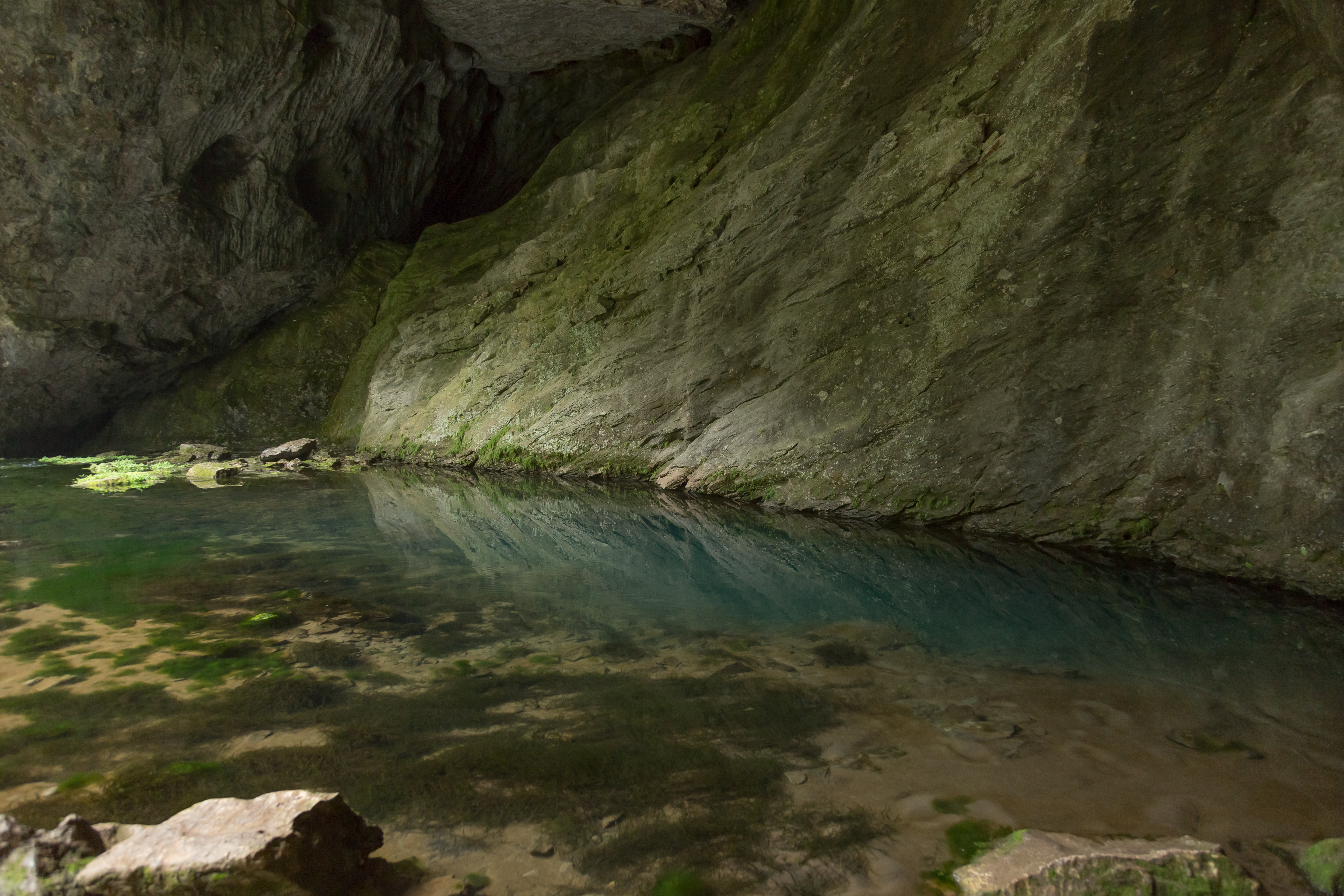 Капова пещера (Шульган-Таш), Бурзянский район This image is related to the protected area of Russia number 0220101